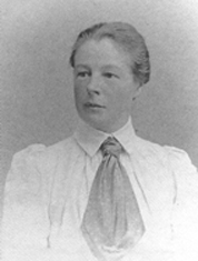 Beatrice Tomasson im Jahr 1883 (Datierung nach Hermann Reisach: Das Vermächtnis der drahtigen Lady. Beatrice Tomasson und die Marmolada-Südwand, Alpenvereinsjahrbuch 2001